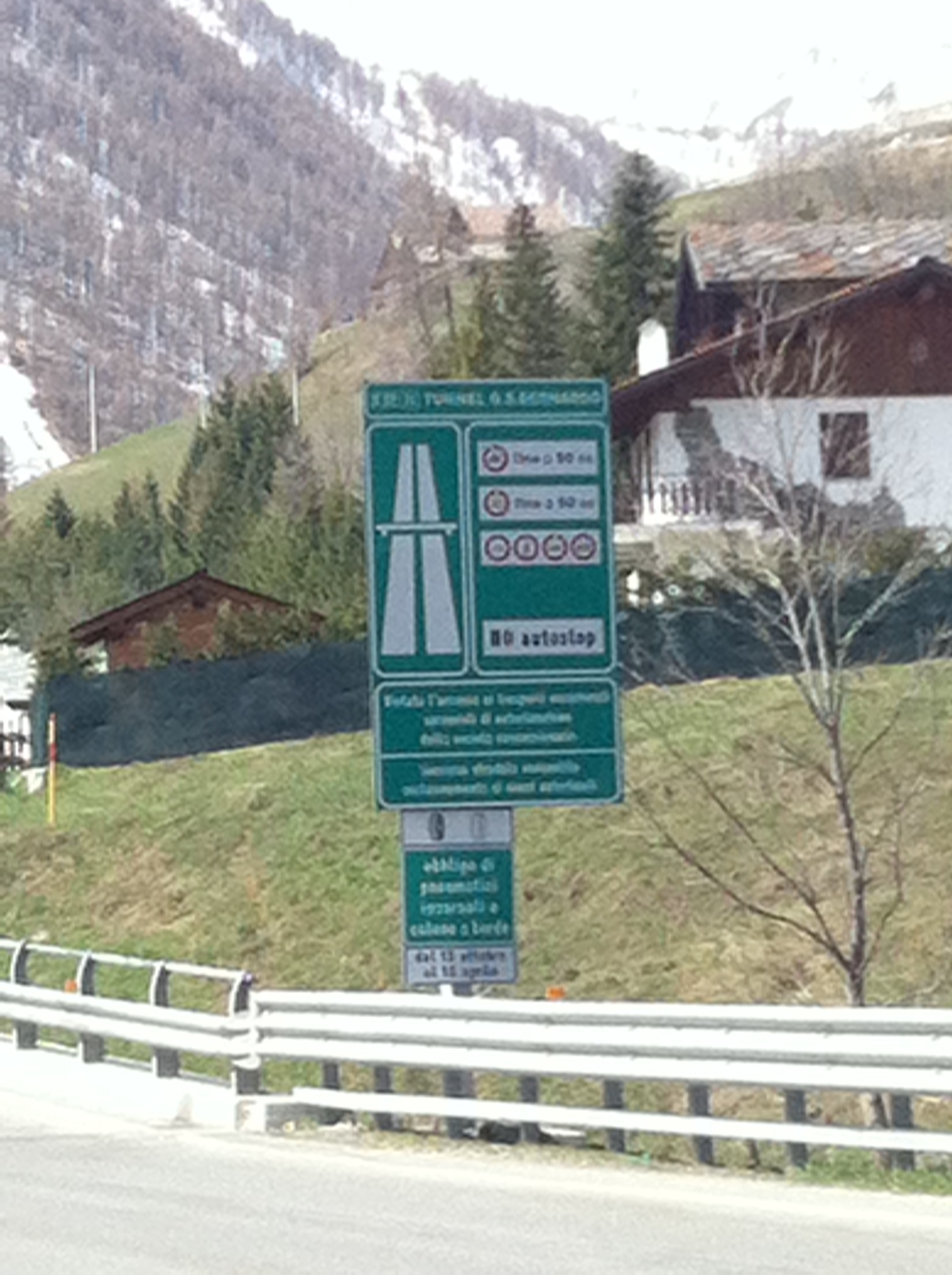 Inizio, dal lato italiano, del raccordo autostradale del Traforo del Gran San Bernardo, nei pressi della stazione di servizio